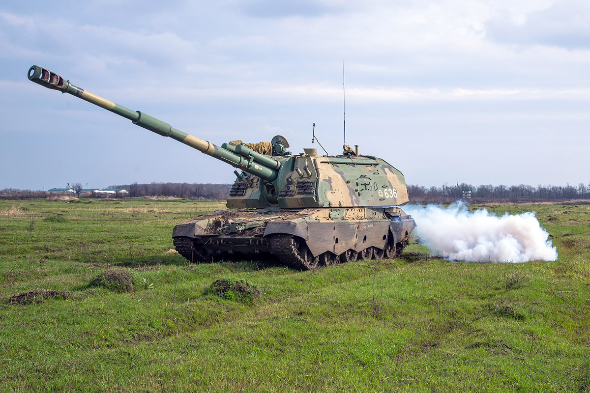 Тактическое учение с подразделениями мотострелковых бригад на полигоне Молькино, Краснодарский край.